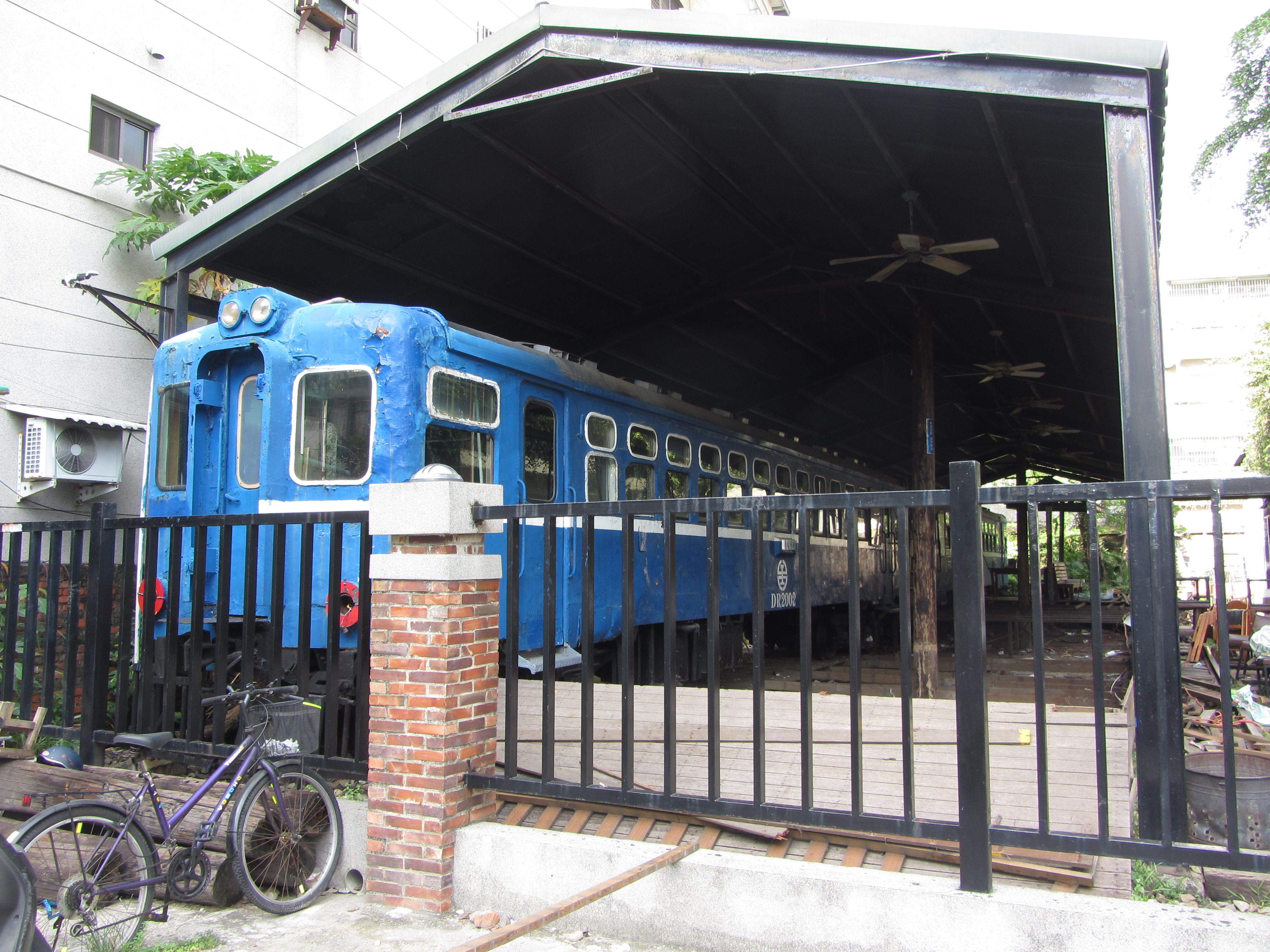 被高雄市鳳山區新台灣原味餐廳鳳山館購下的DR2002和DR2063車廂